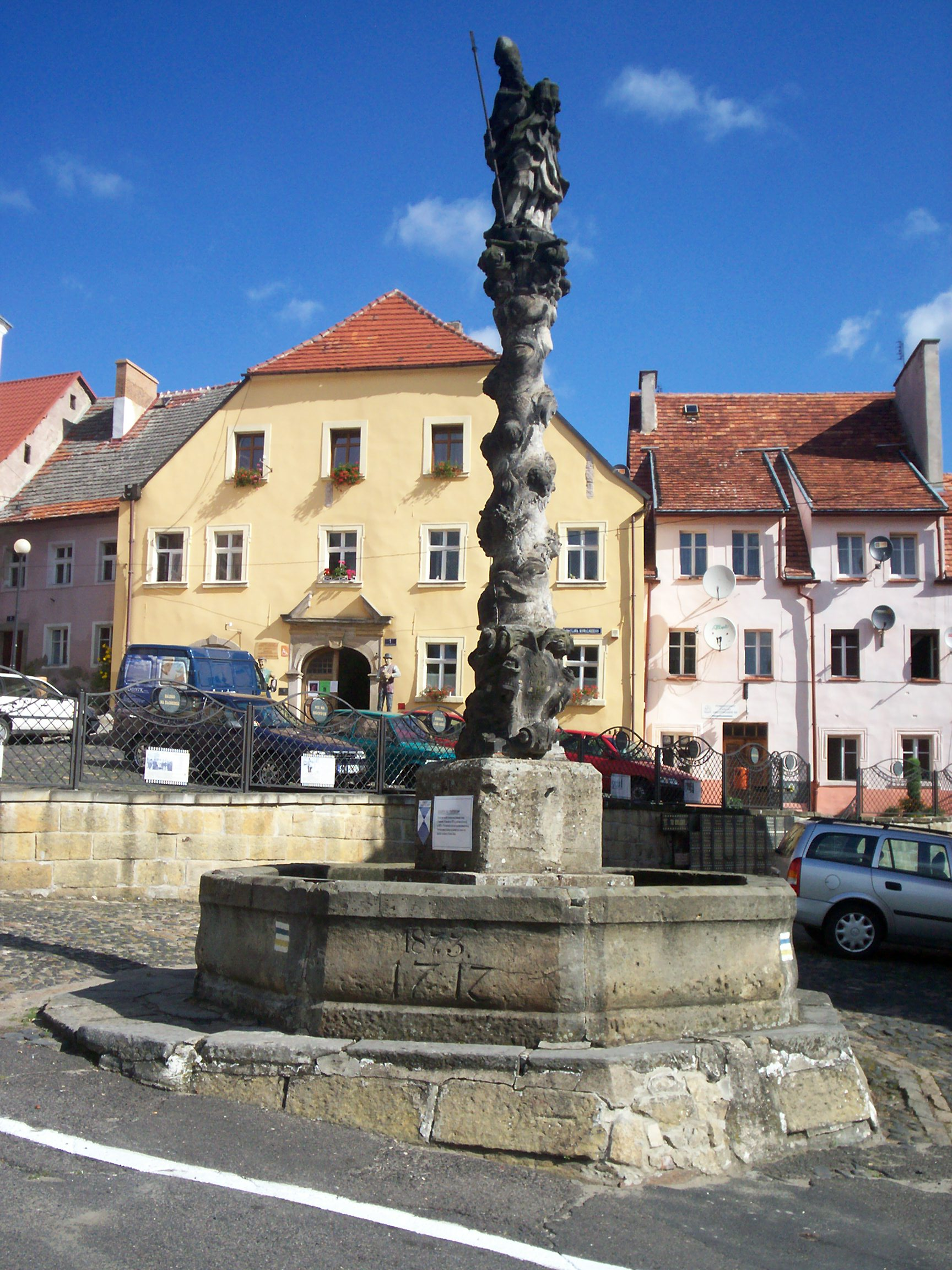 Maternusbrunnen und Leinenweberhaus in Lubomierz, Polen